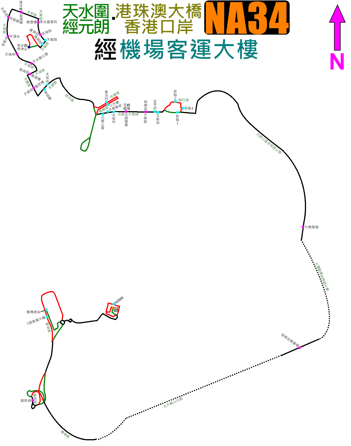 中文（香港）: 龍運巴士NA33線的走線圖